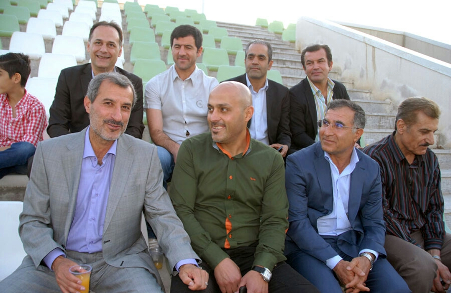 پایین - راست: منصور رشیدی - مجید جلالی، علی چینی - محمد مایلی‌کهن بالا - راست: حمید استیلی - بهنام ابوالقاسم‌پور - کریم باقری